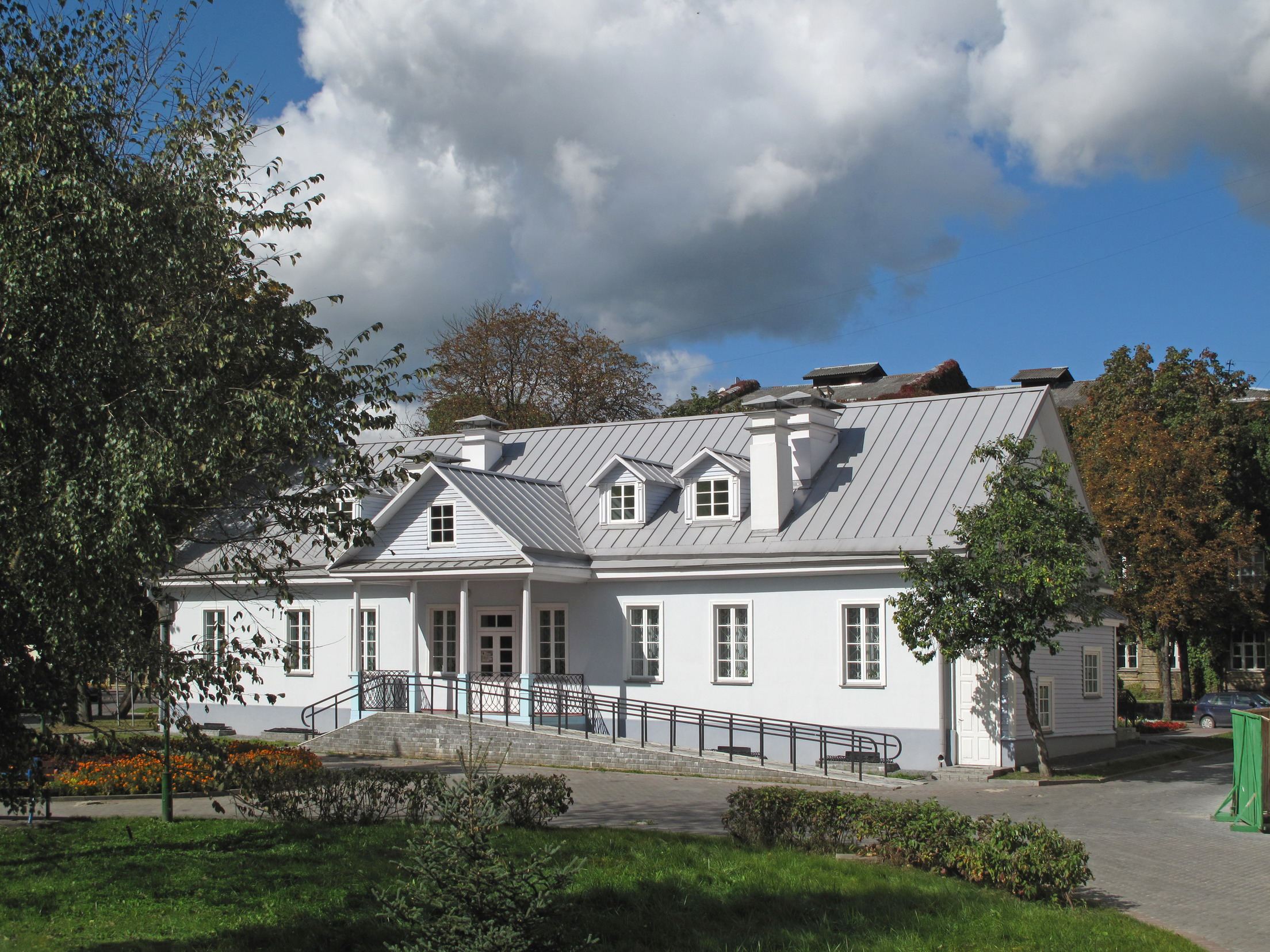 Беларуская (тарашкевіца): Дом Э Ожешко